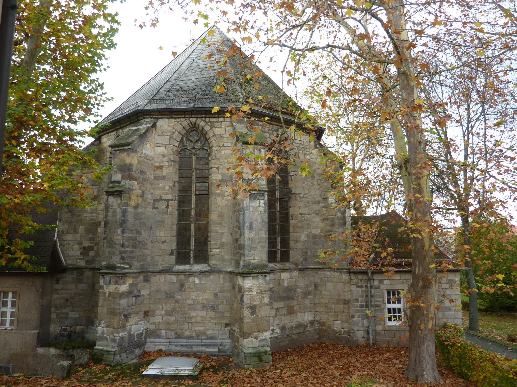 Friedhofskapelle (Weißenfels), Chor der Klosterkirche des Clarenklosters